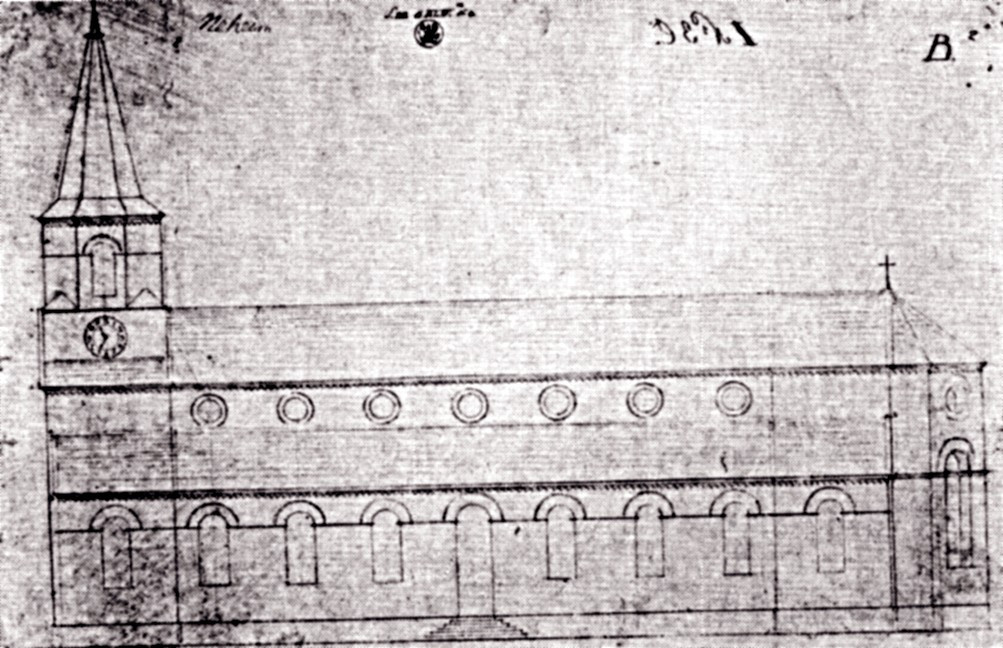 Ausführungsentwurf für die Kirche St. Johannes Baptist in Neheim. Zeichnung von Ernst Vincenz Plassmann nach dem Korrekturentwurf von Karl Friedrich Schinkel